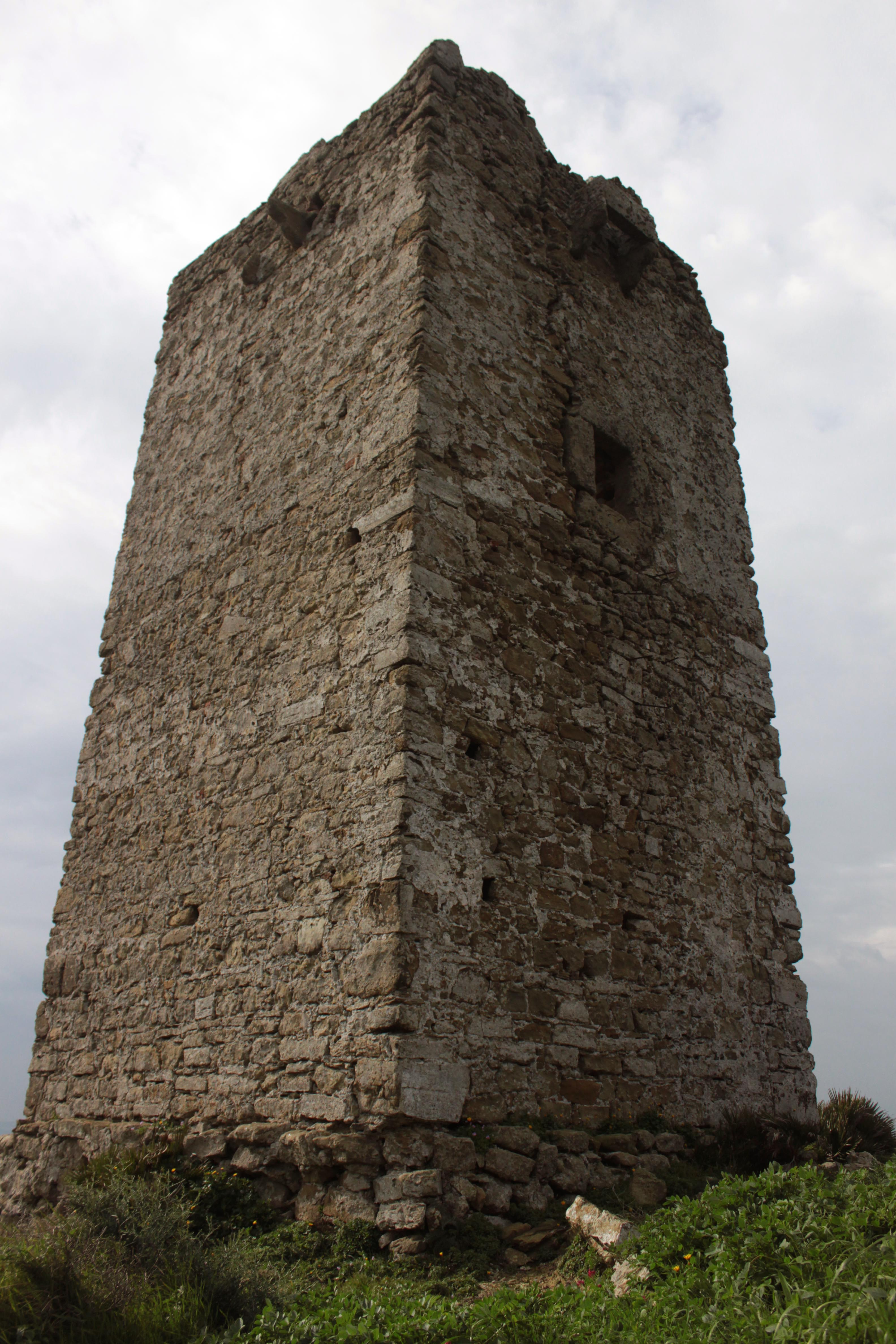 Torre del Fraile, también llamada de los canutos o de las Fontanillas construida en 1588 en la localidad española de Algeciras. Fachada noroeste.